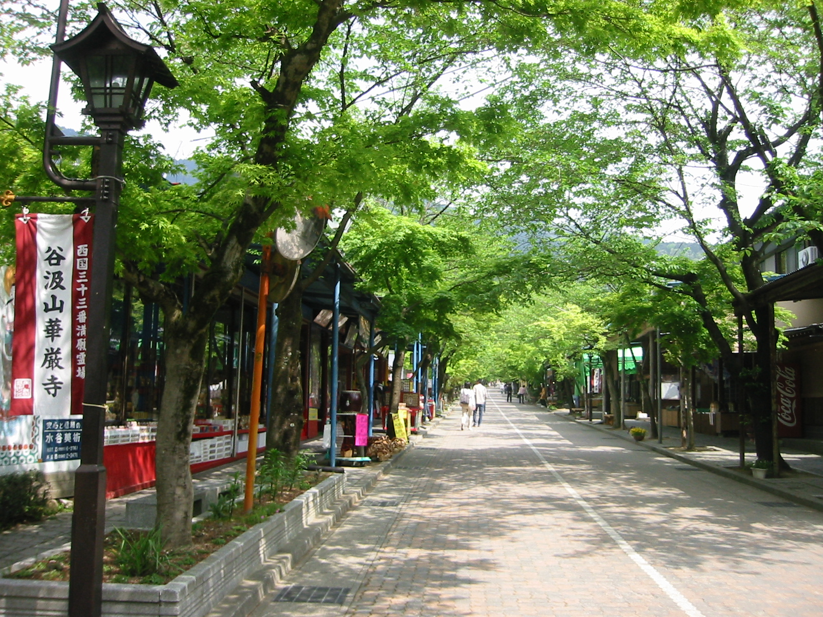 谷汲山華厳寺